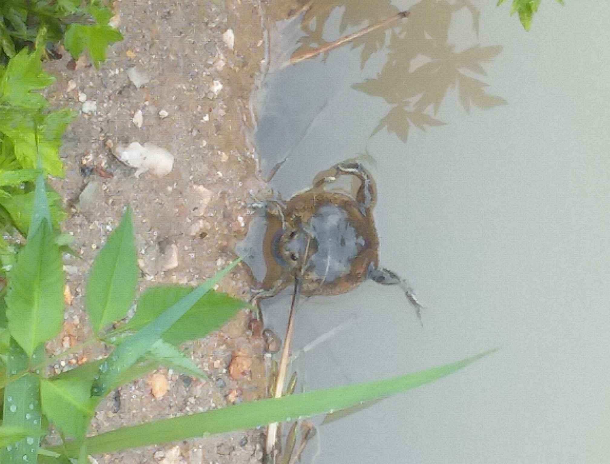 7월의 짝짖기 계절의 맹꽁이